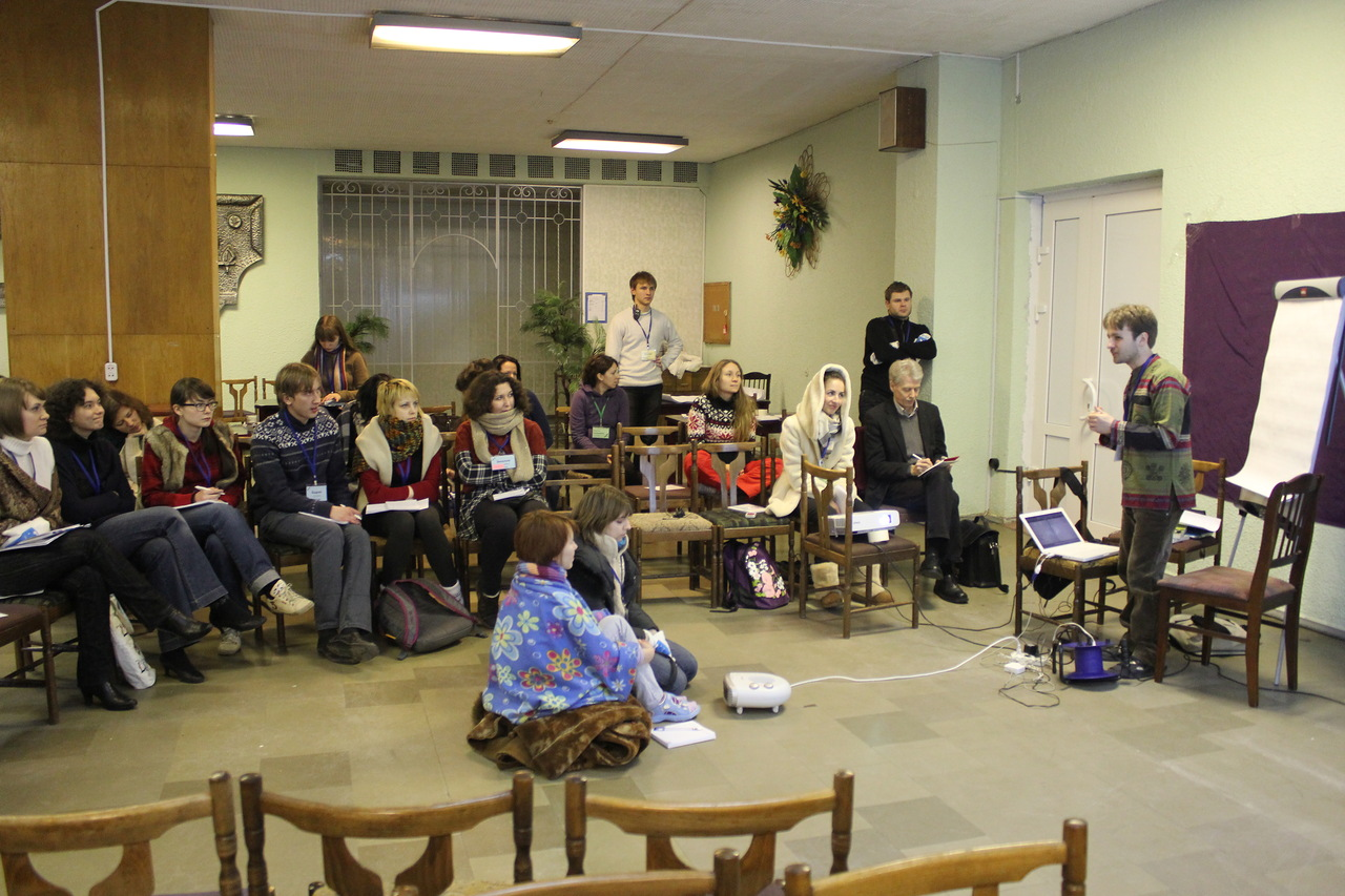 Одно из мероприятий Зимней психологической школы СПбГУ в 2012 году. Лекция Филиппа Барского.